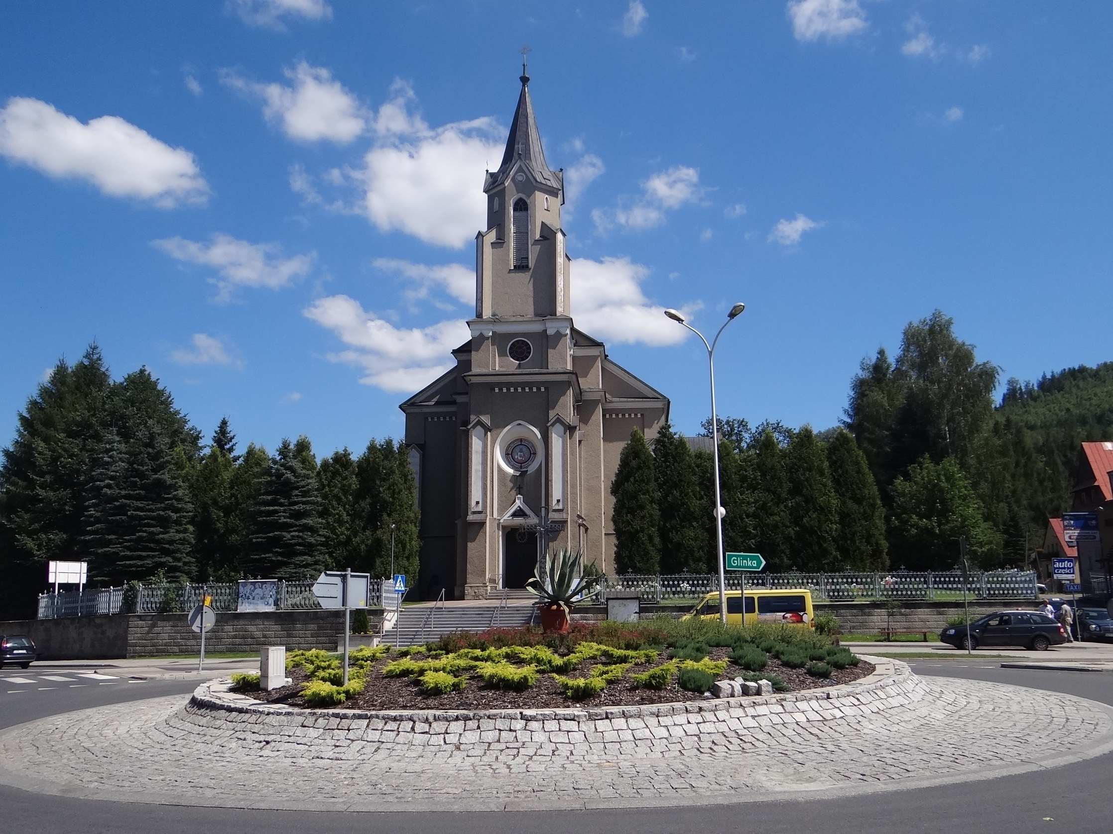 Centrum miejscowości Rajcza